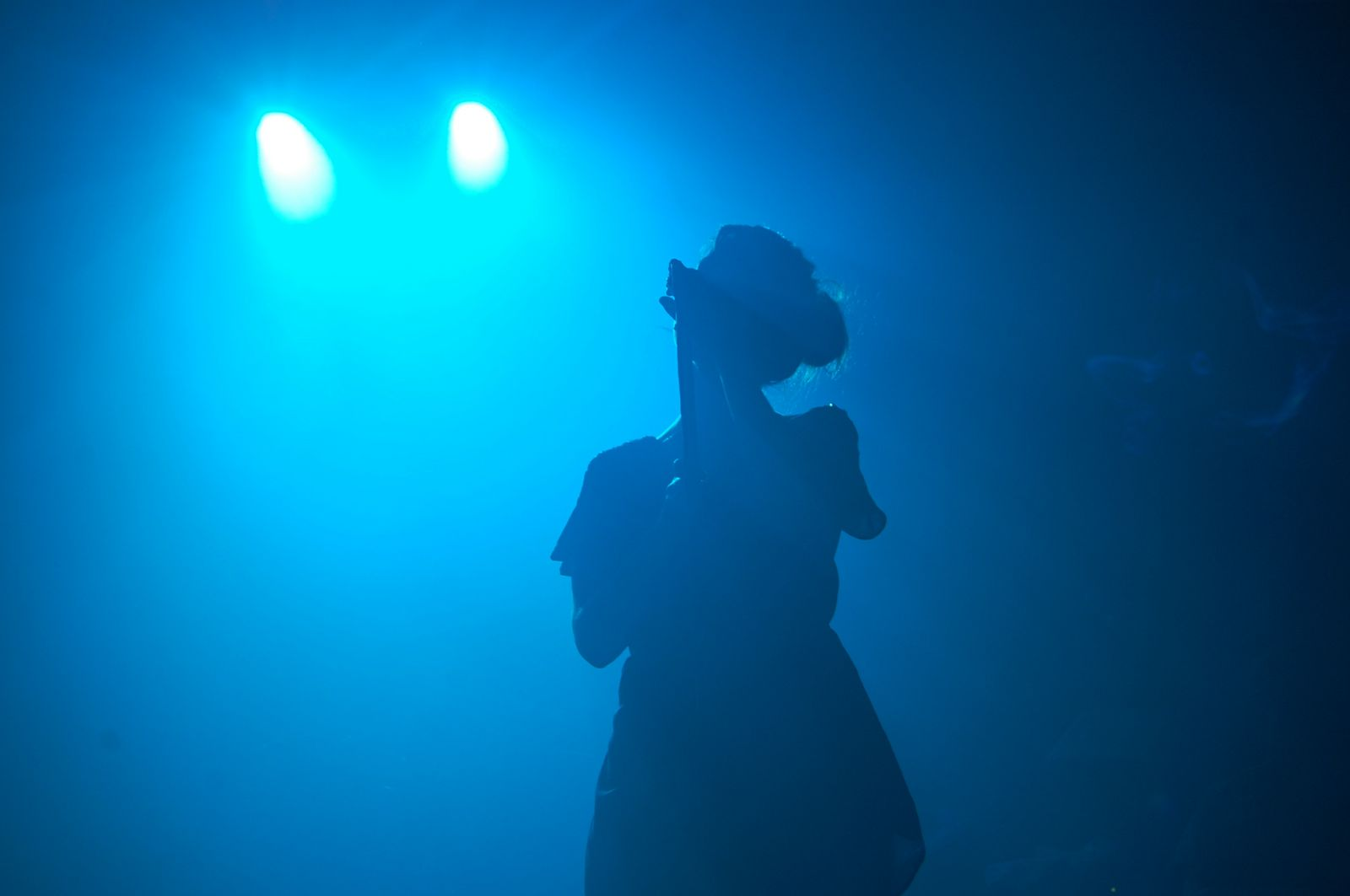 Nena Daconte - concierto final de gira Retales de Carnaval II